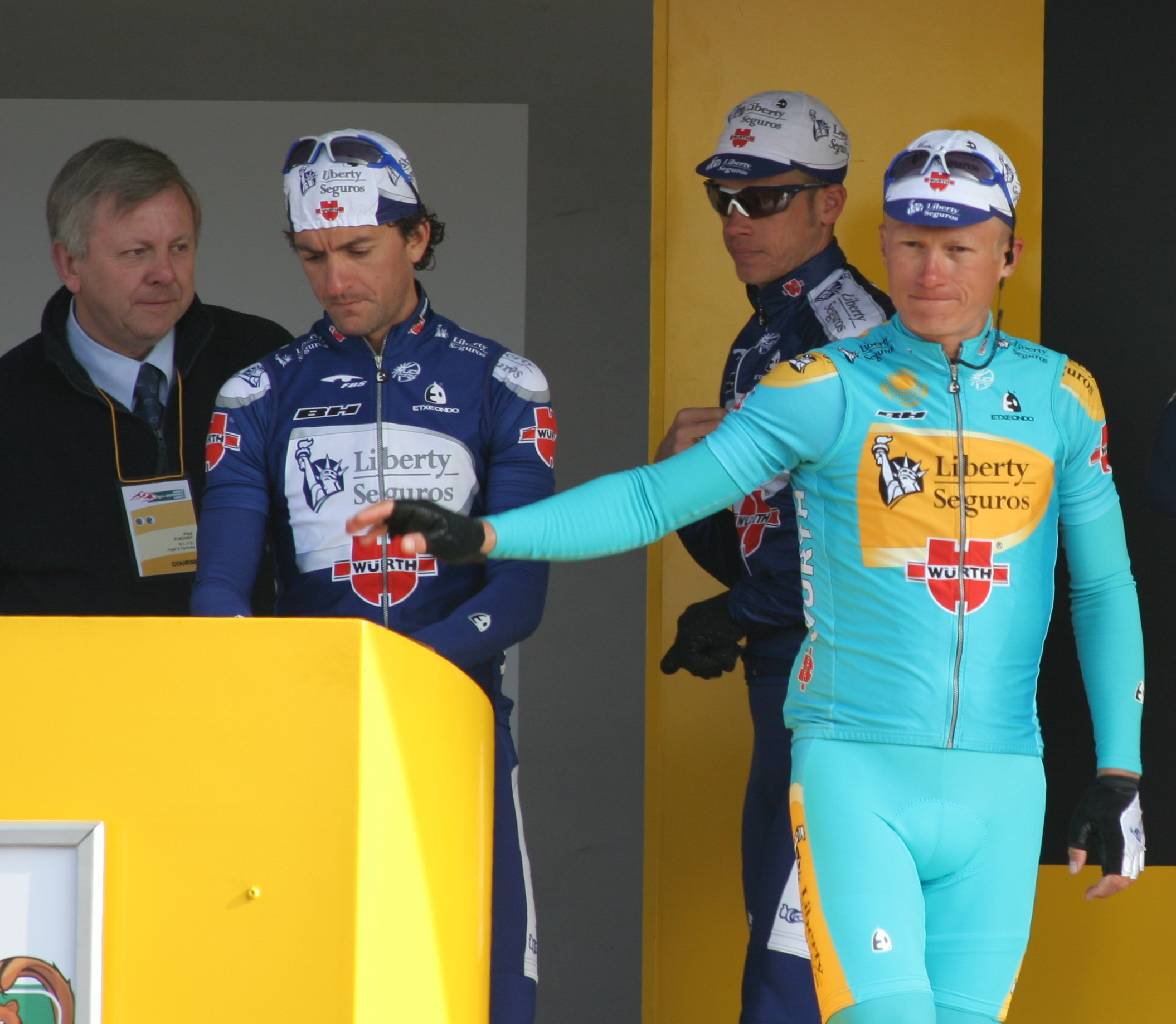 Alexander Vinokourov in Liège for Liège-Bastogne-Liège 2006